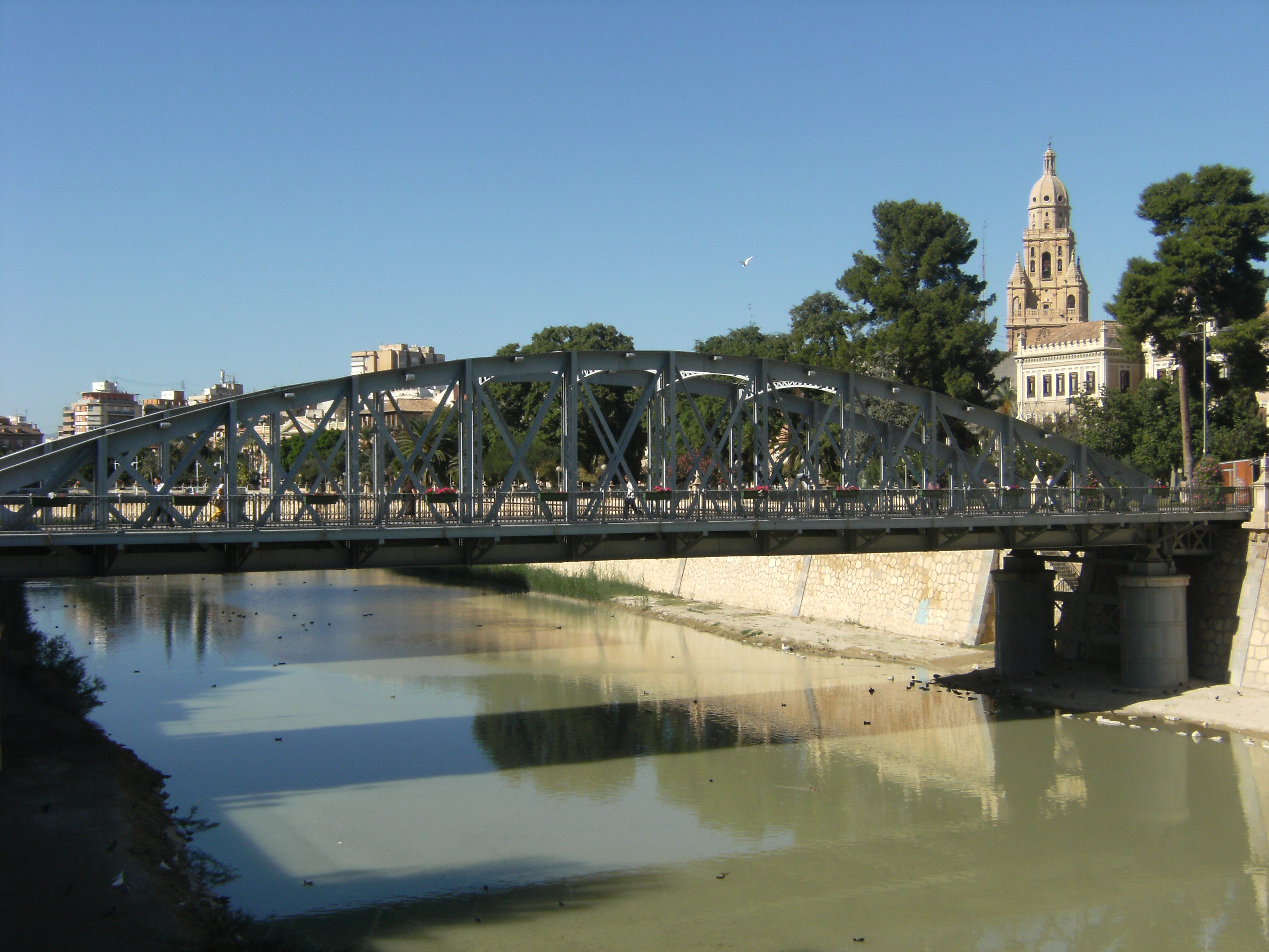 Vista del Puente Nuevo o de Hierro de la ciudad de Murcia (España) sobre el río Segura. De finales del siglo XIX.